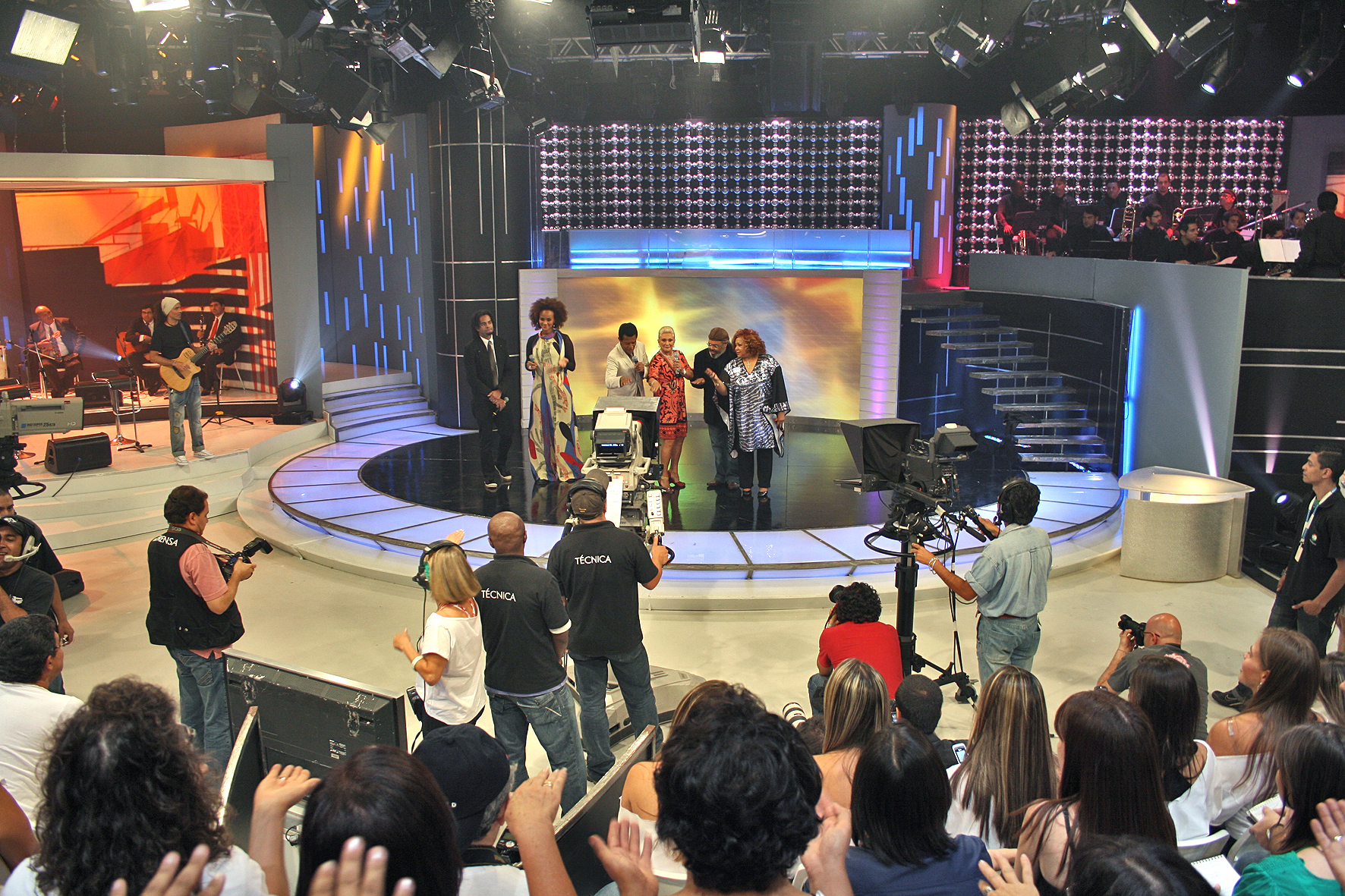 Programa de Hebe Camargo no Sistema Brasileiro de Televisão, com a participação de Luciana Mello, Jorge Aragão, Jair Rodrigues e Alcione.